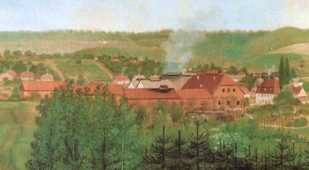 Glashütte Grünenplan